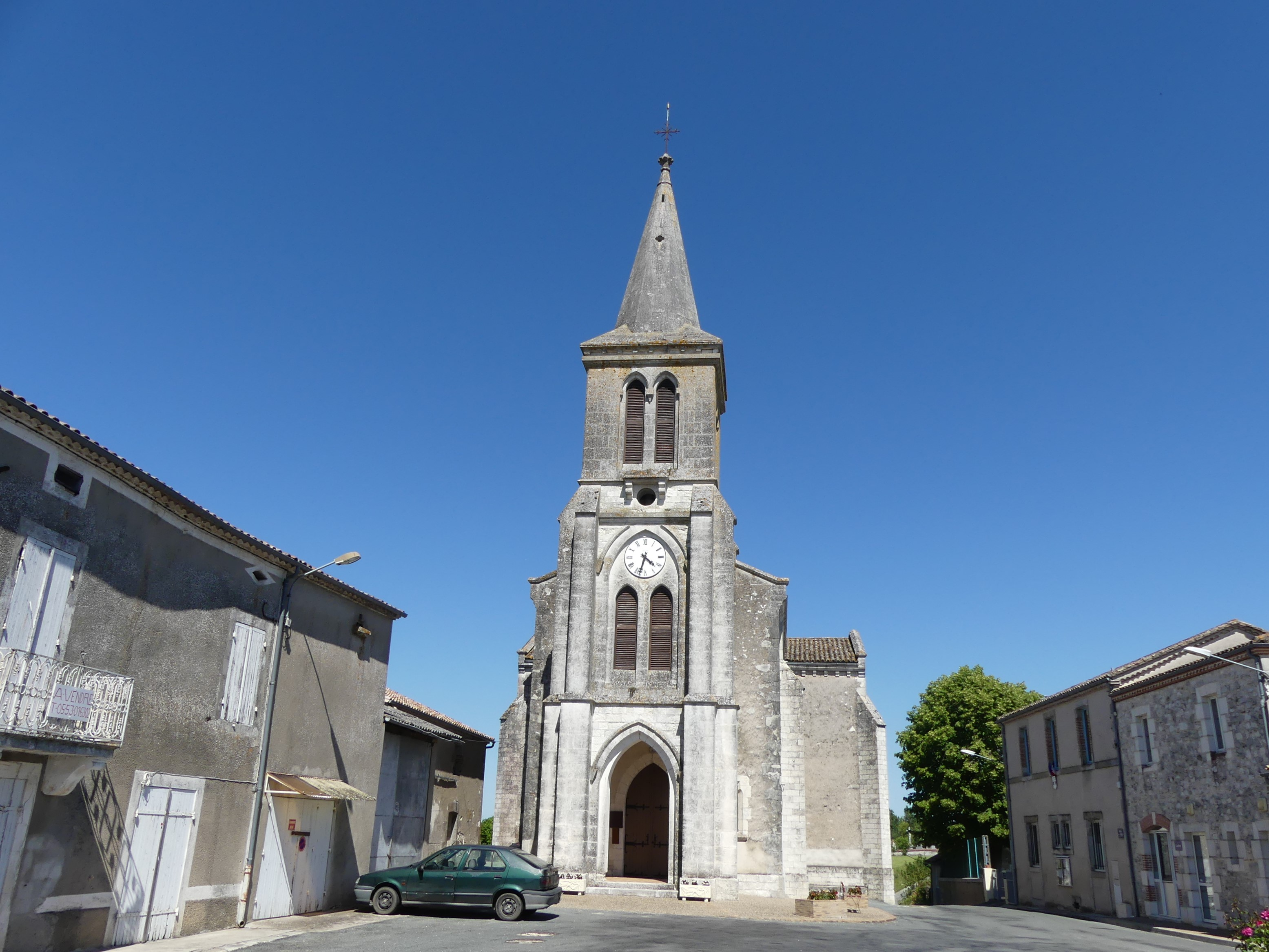 L'église de Castelnaud-de-Gratecambe, Lot-et-Garonne, France.